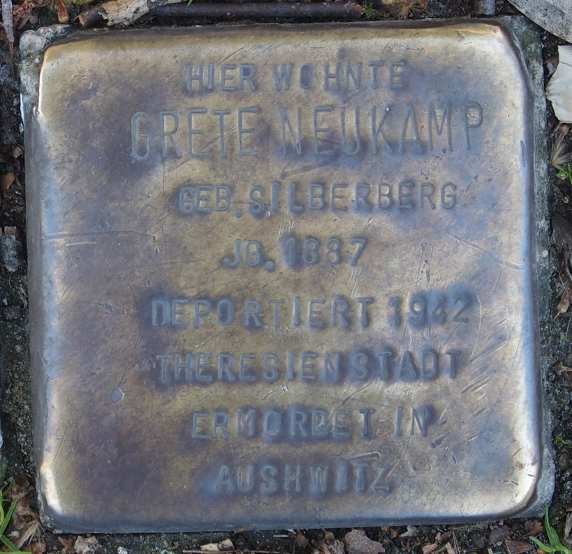 Stolperstein in Soest Teichmühlengasse 1, Grete Neukamp